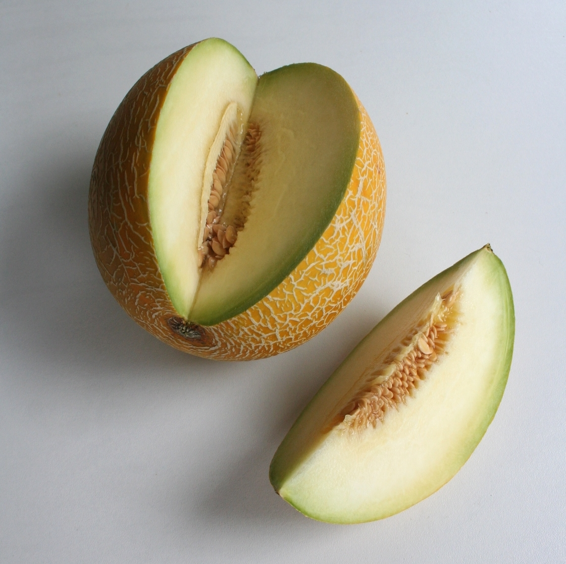 Galiamelone (Cucumis melo (Reticulatus Group) 'Galia')